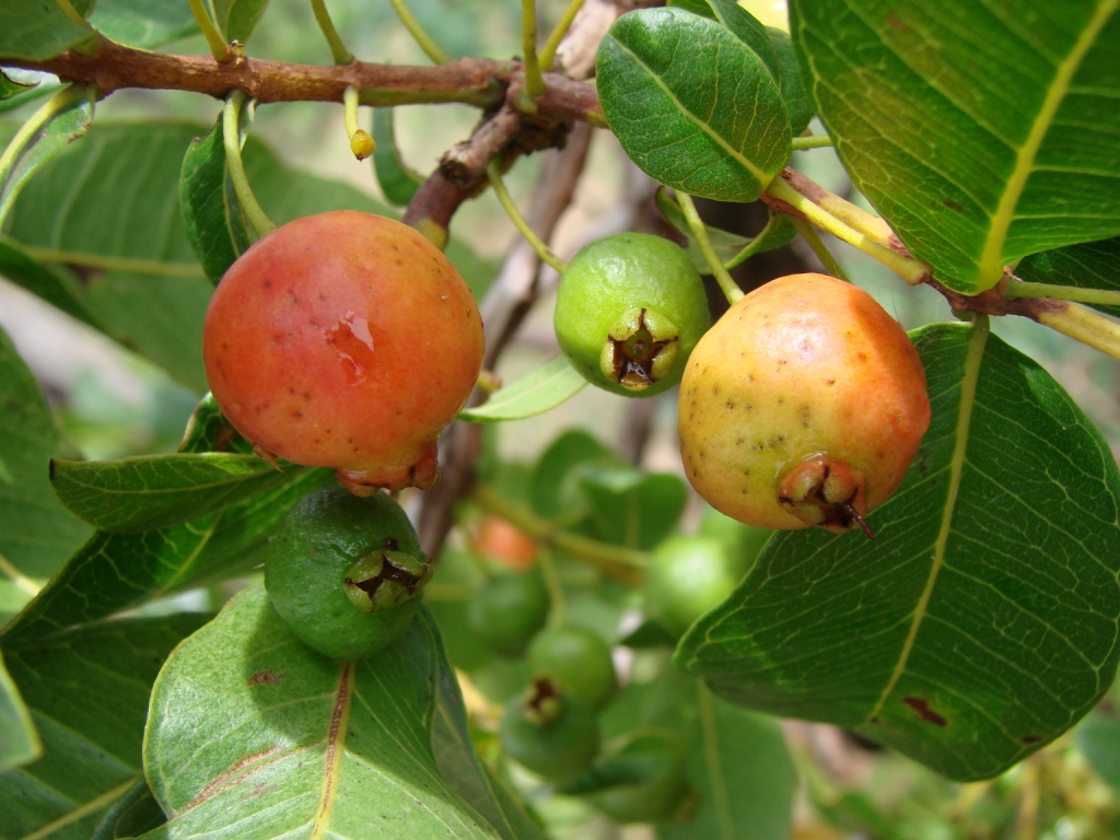 Psidium longipetiolatum D.Legrand - MYRTACEAE - Parque Estadual da Serra dos Pirineus - Pirenópolis - Goiás - Brasil.